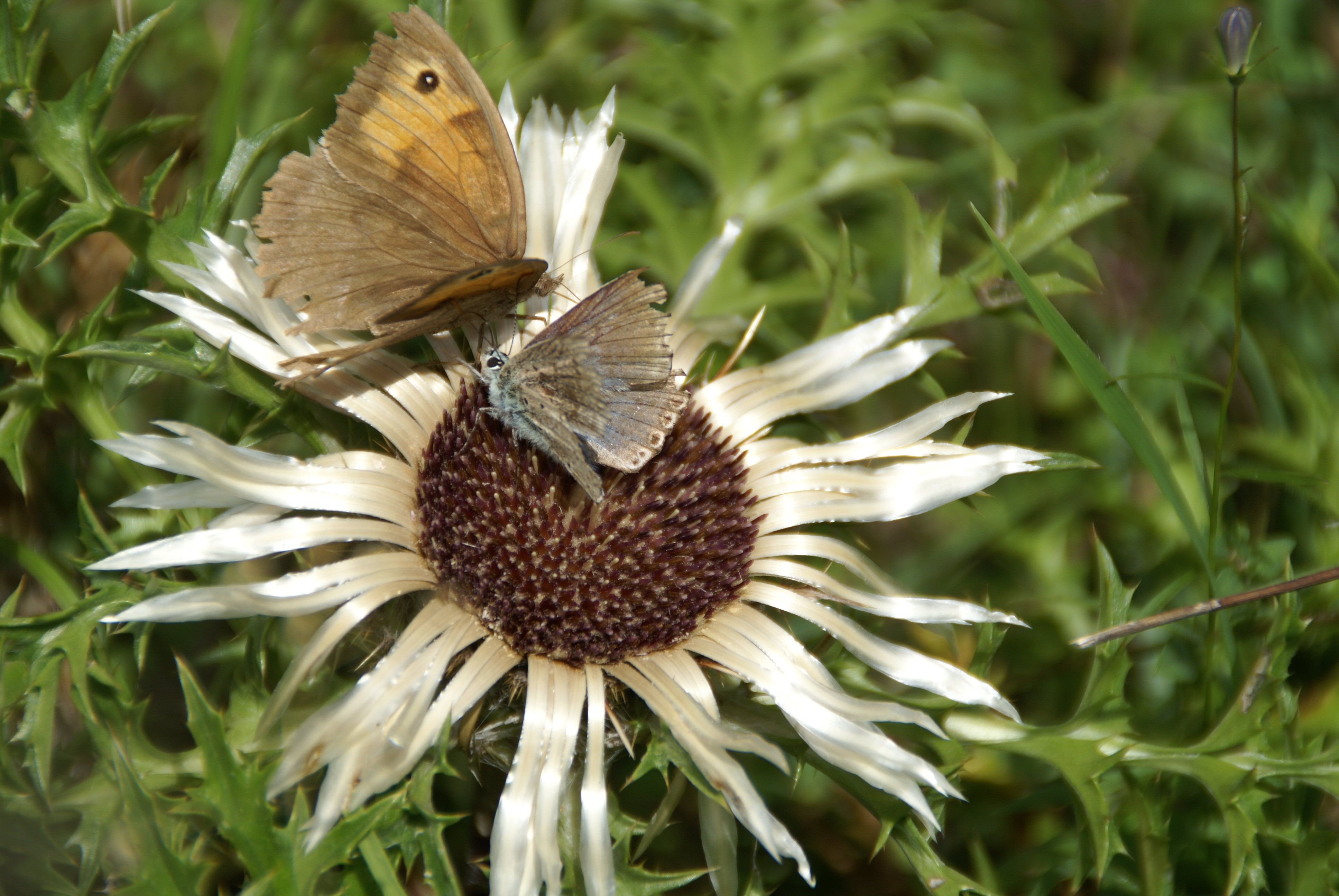 Zwei Schmetterlinge saugen den nahrhaften Nektar der Silberdistel. Bild wurde auf einer Wacholderheide bei Heubach (Schwäbische Ostalb) aufgenommen.